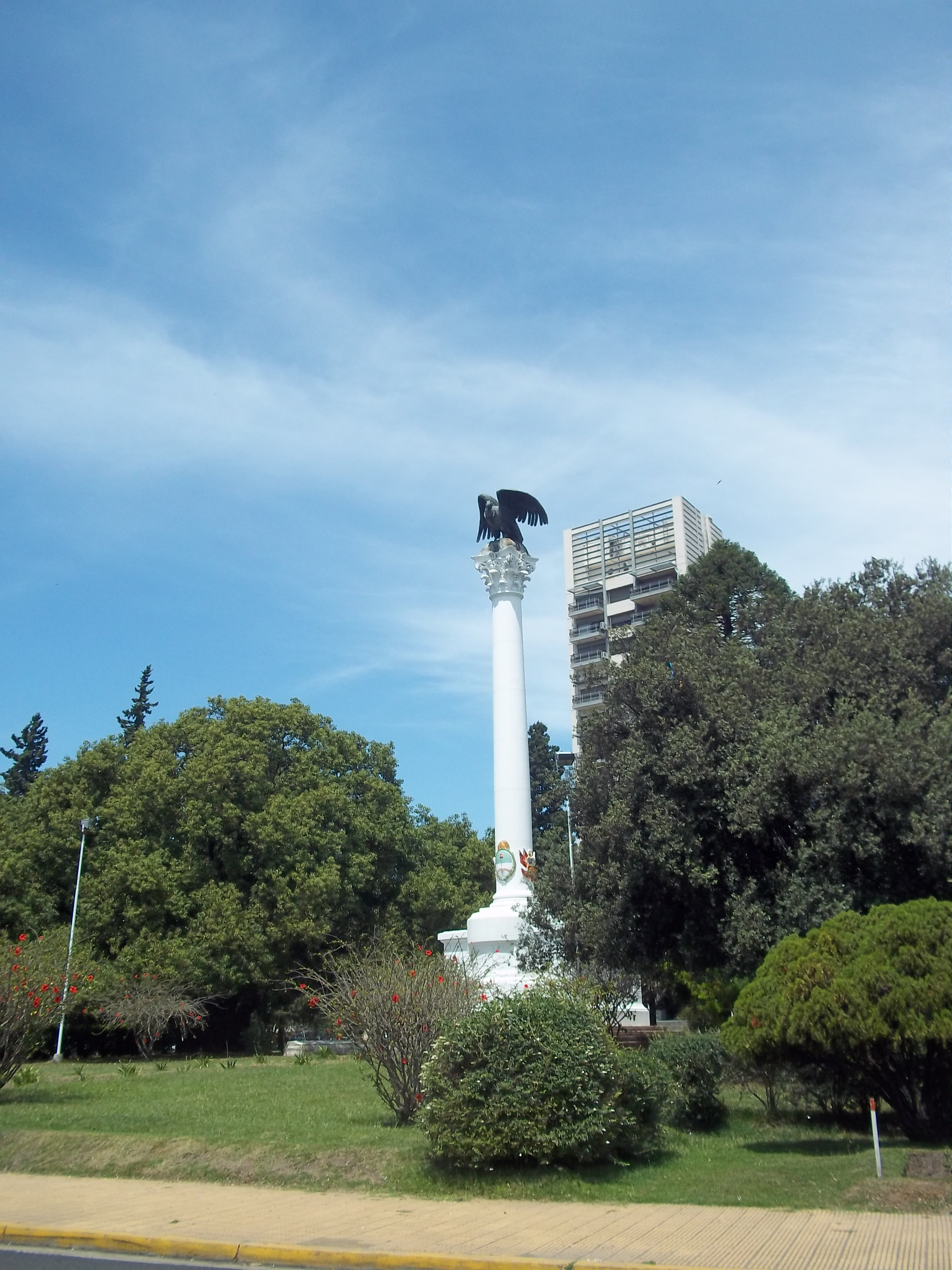 Escultura ubicada en el Parque Urquiza - Paraná (Entre Ríos)